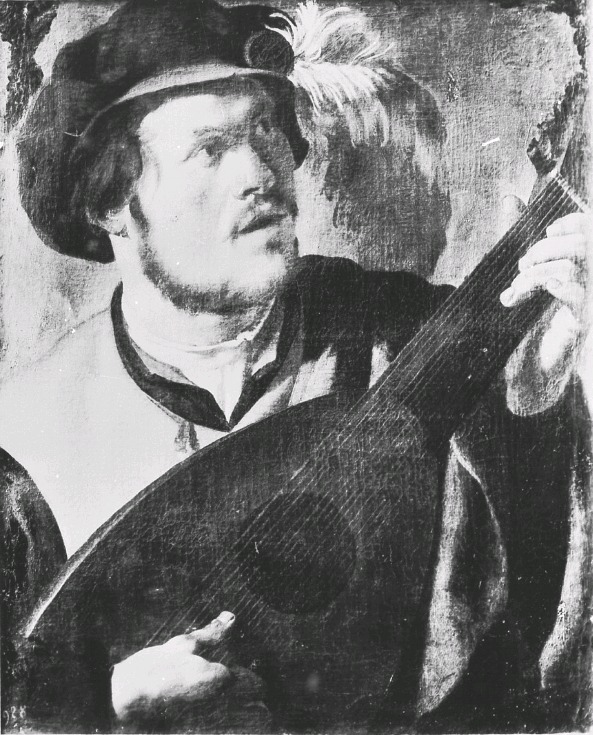 Lautenspieler. 75 x 60,5 cm, Inventar-Nr. GK 178